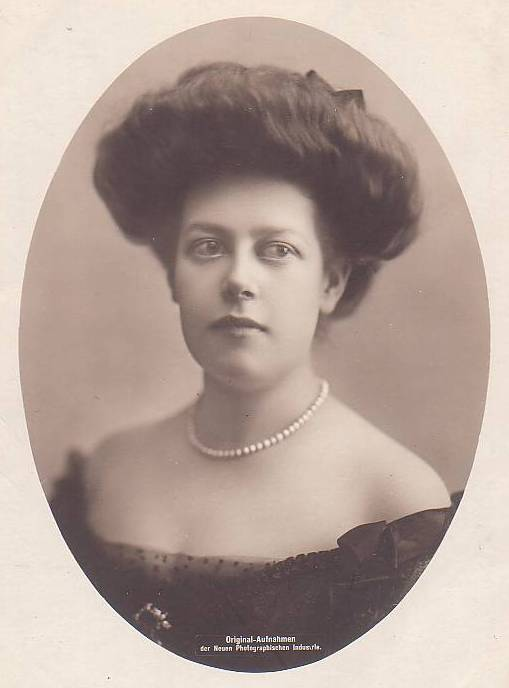 Portrait of Duchess Marie Antoinette of Mecklenburg (1884-1944)